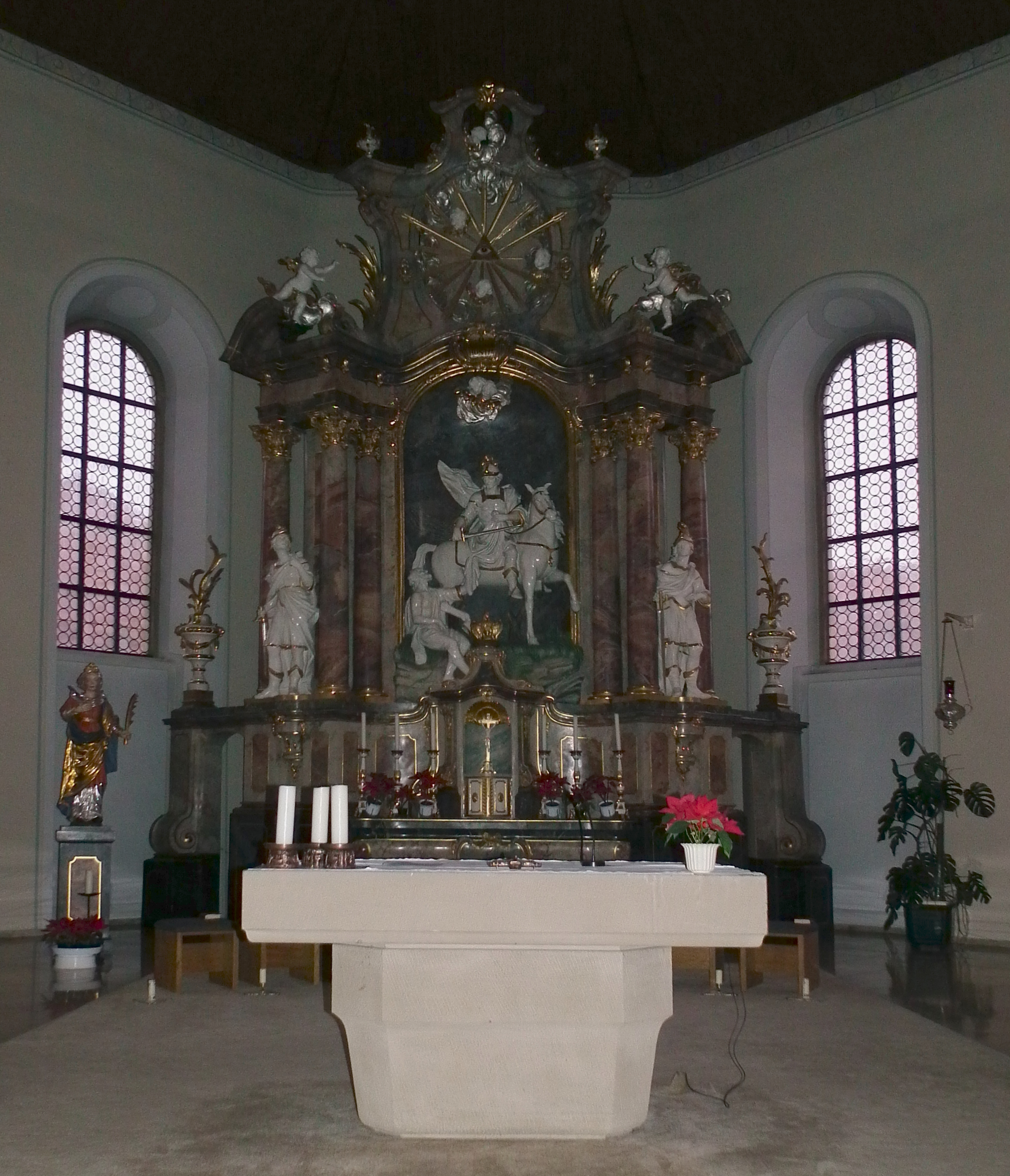 Chor und Altar der katholischen Kirche St. Juliana in Malsch (Baden-Württemberg, Deutschland)